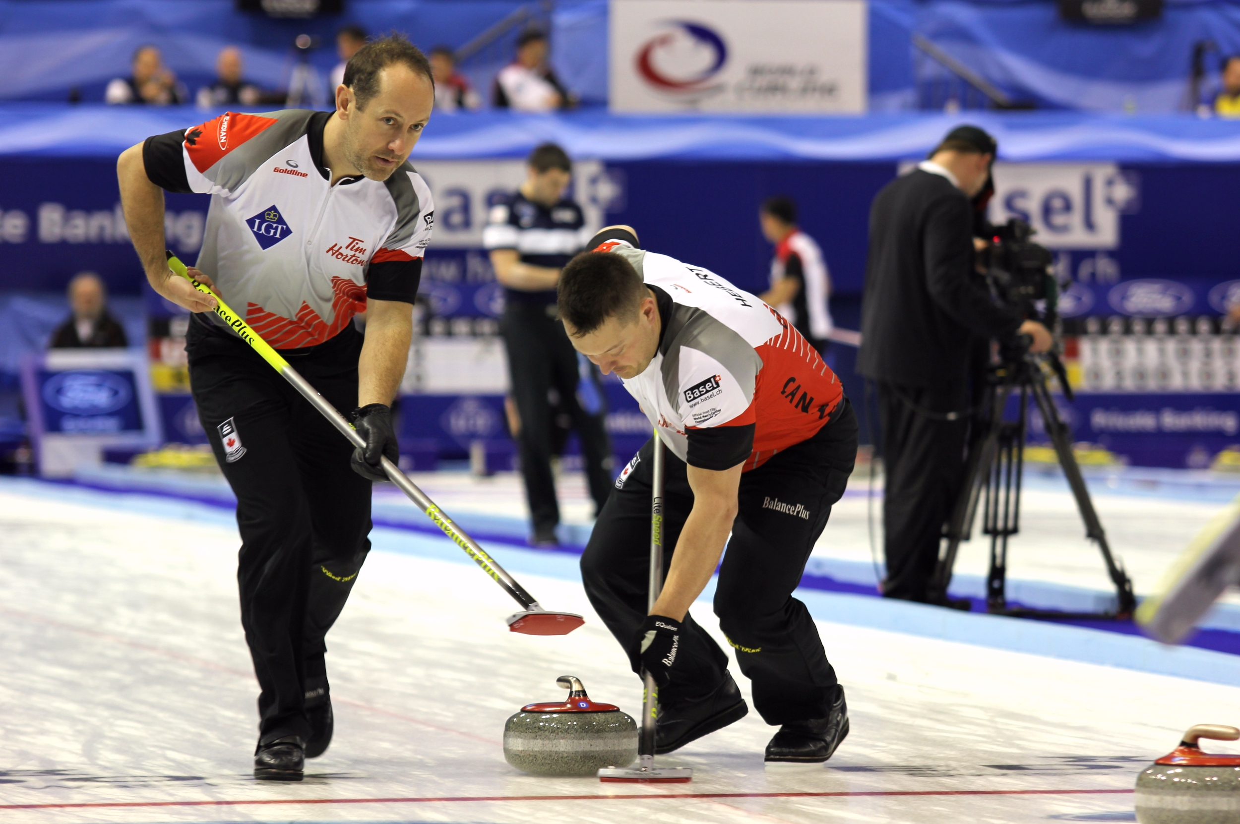 Brent Laing, Ben Hebert (CAN).